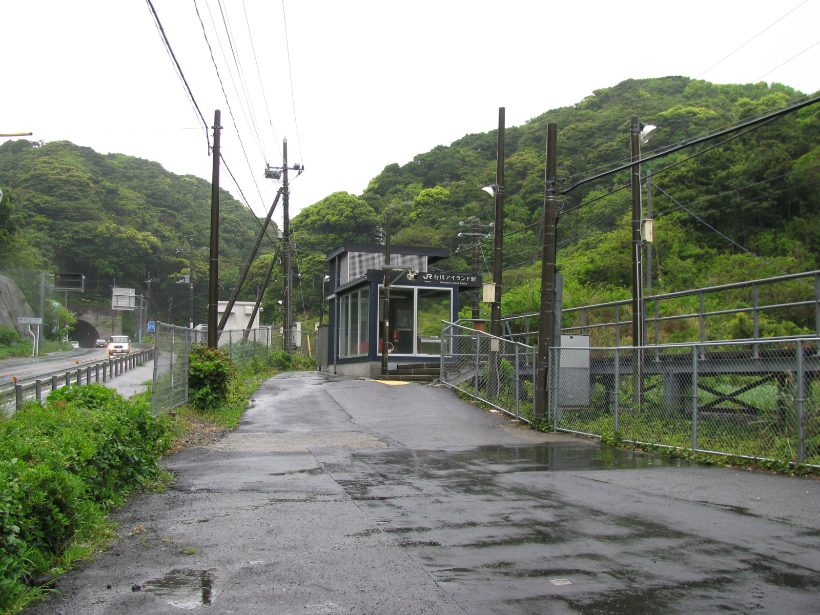 外房線行川アイランド駅